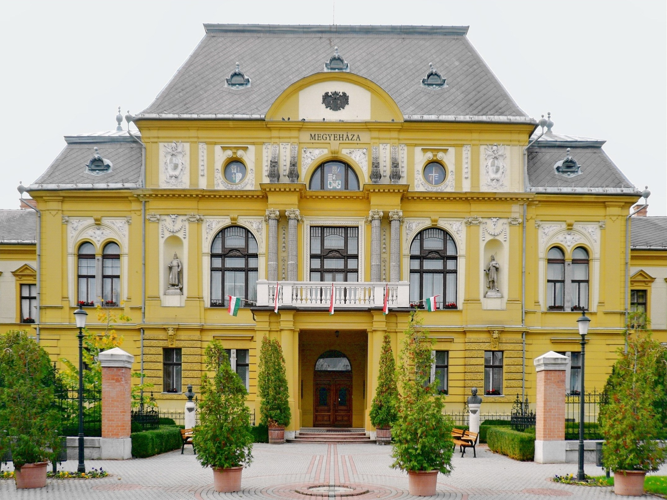 Megyeháza